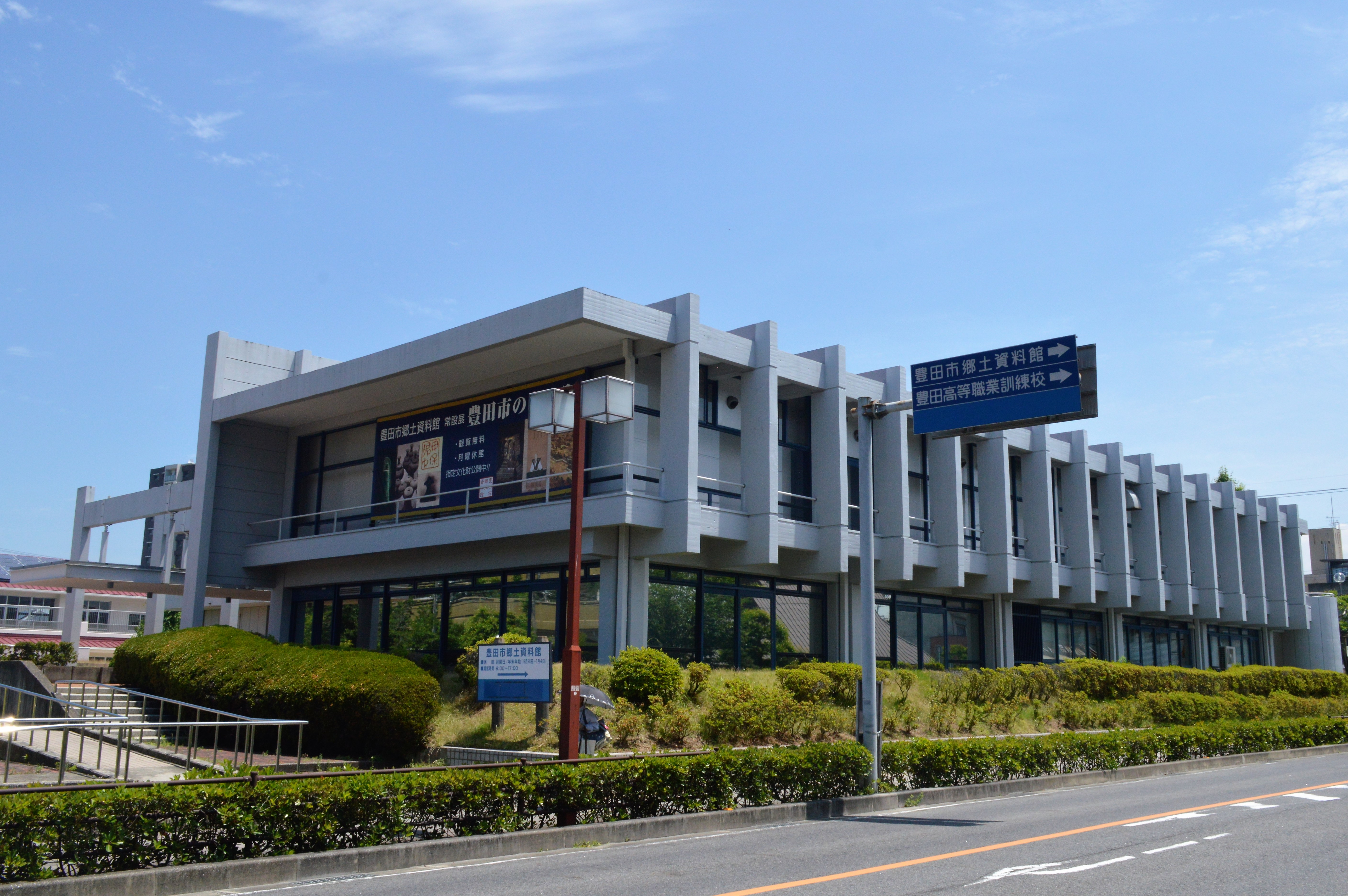 愛知県豊田市陣中町1丁目の豊田市立図書館。1970年から1998年まで使用された。現在は豊田市郷土資料館の文化財倉庫。